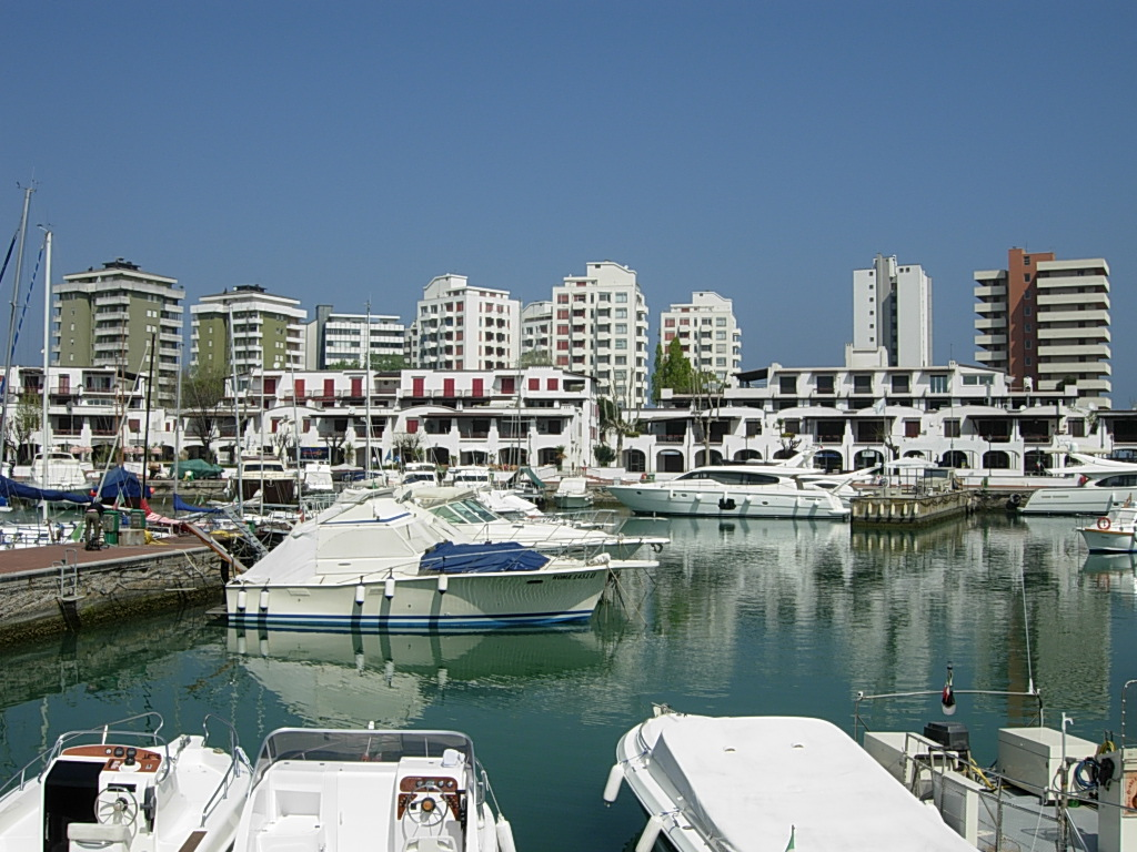 Darsena a Portoverde (Misano Adriatico)